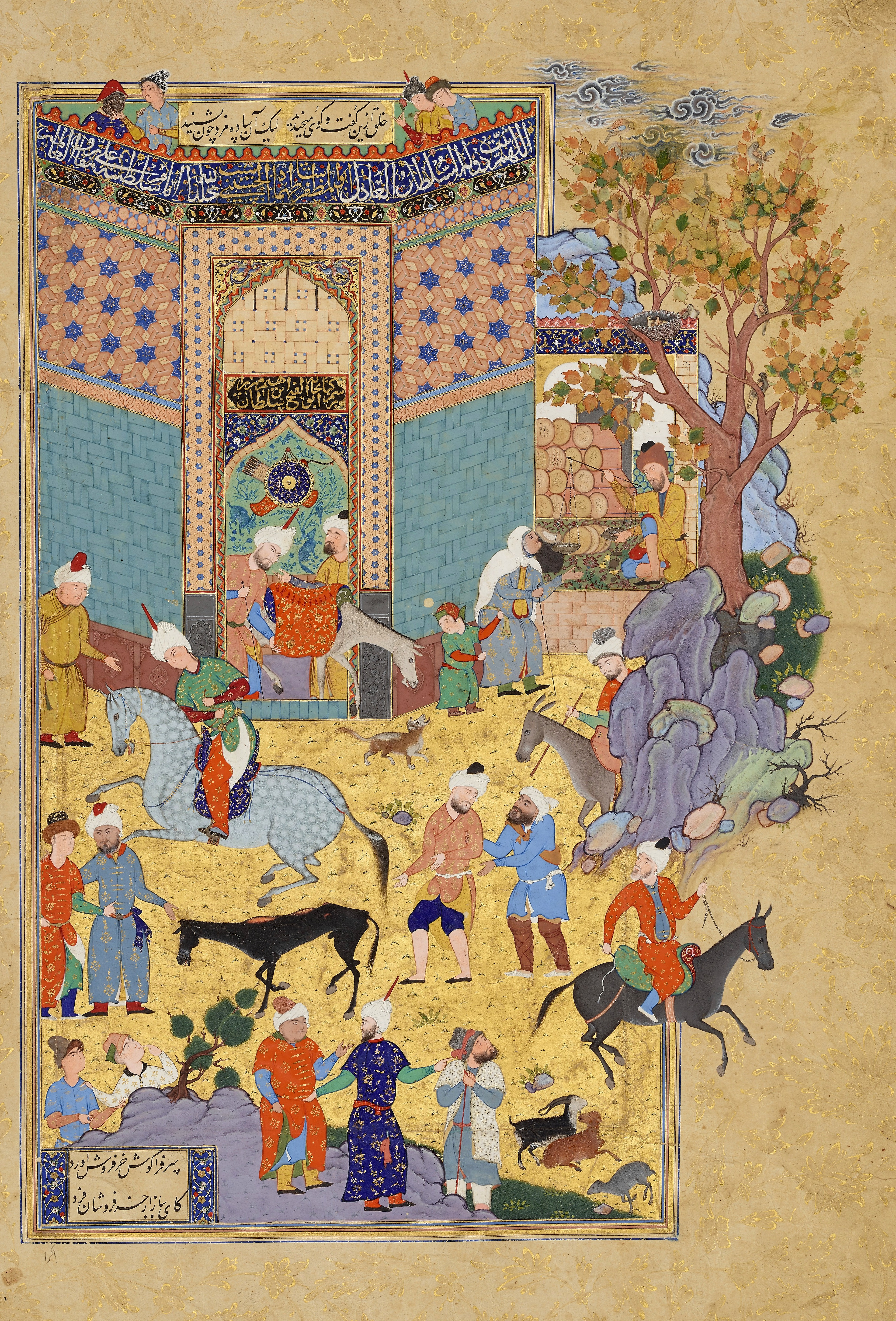 Продажа ишака. Хафт Ауранг, Джами. 1556-65. Фрир